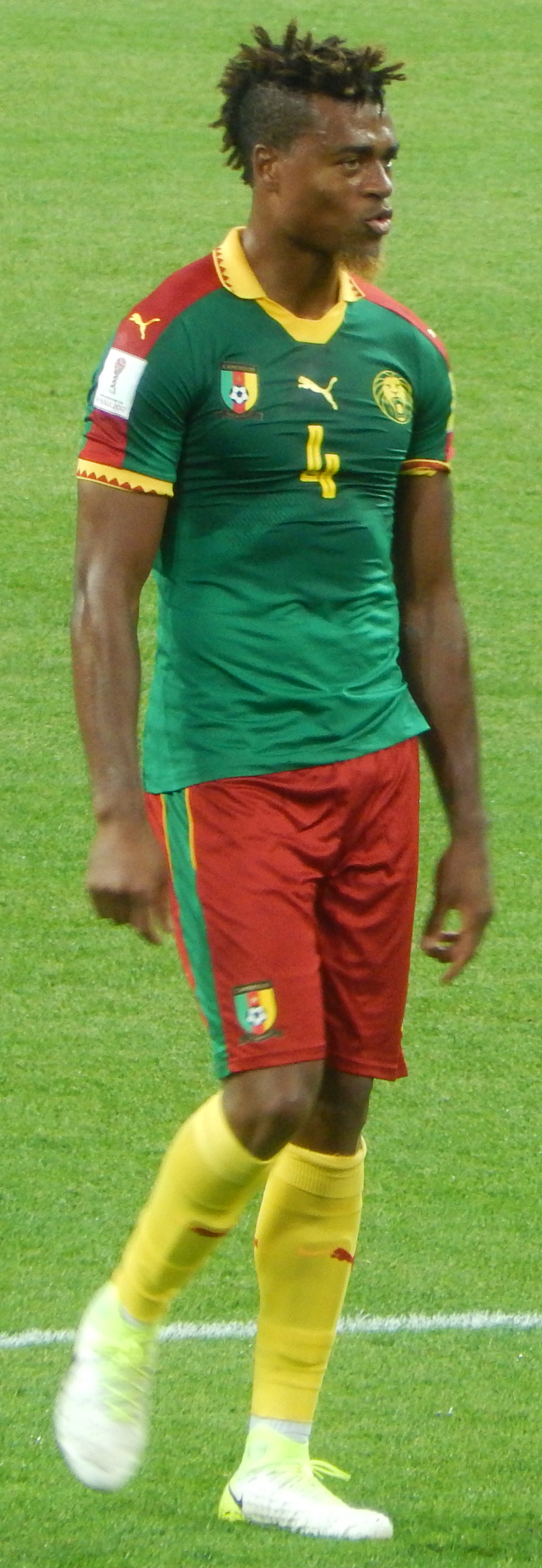 Адольф Тейку во время матча против сборной Чили